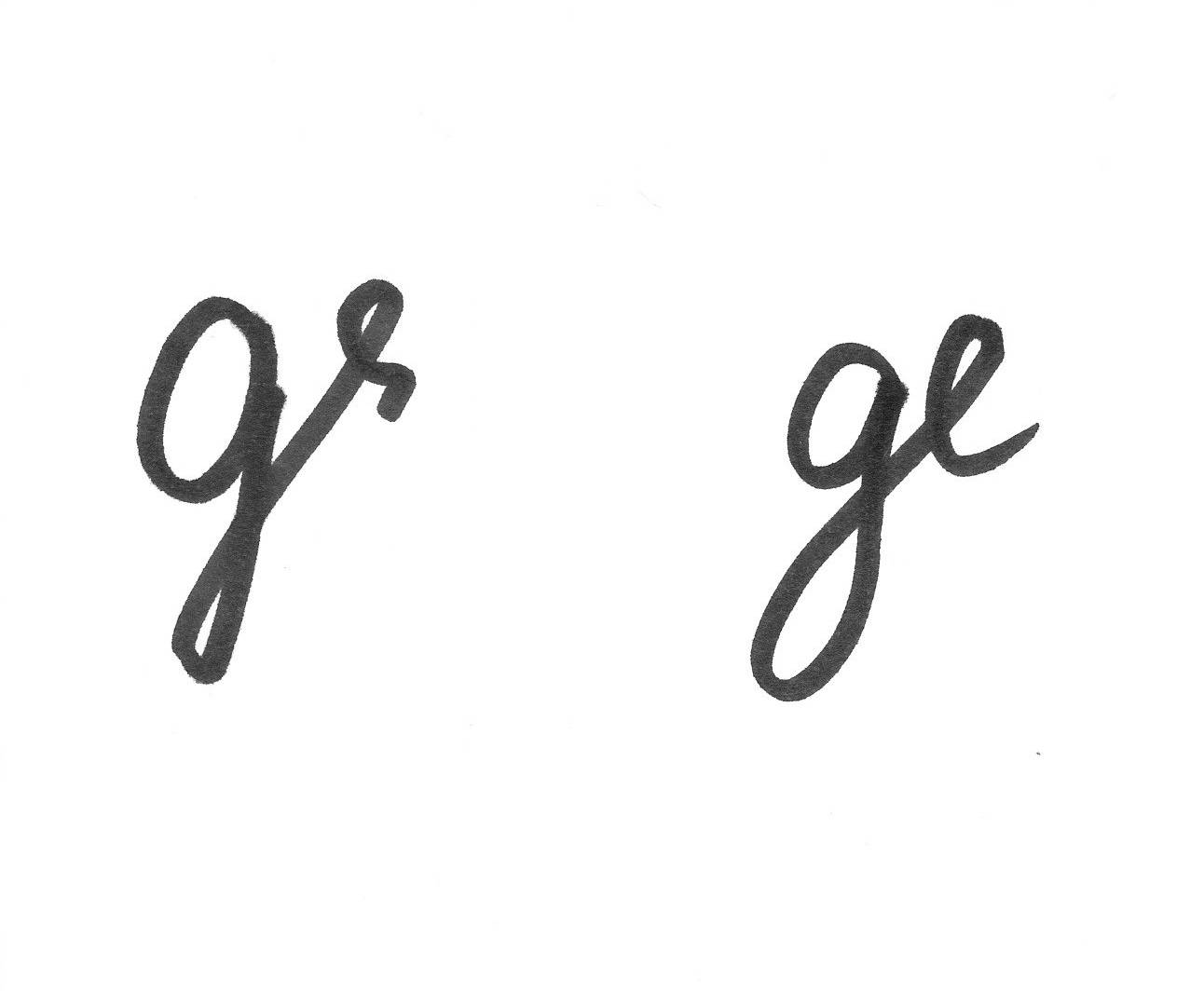 Für Groschen und Grote im Schriftverkehr des 18. und 19. Jahrhunderts verwendete Abbreviatur.